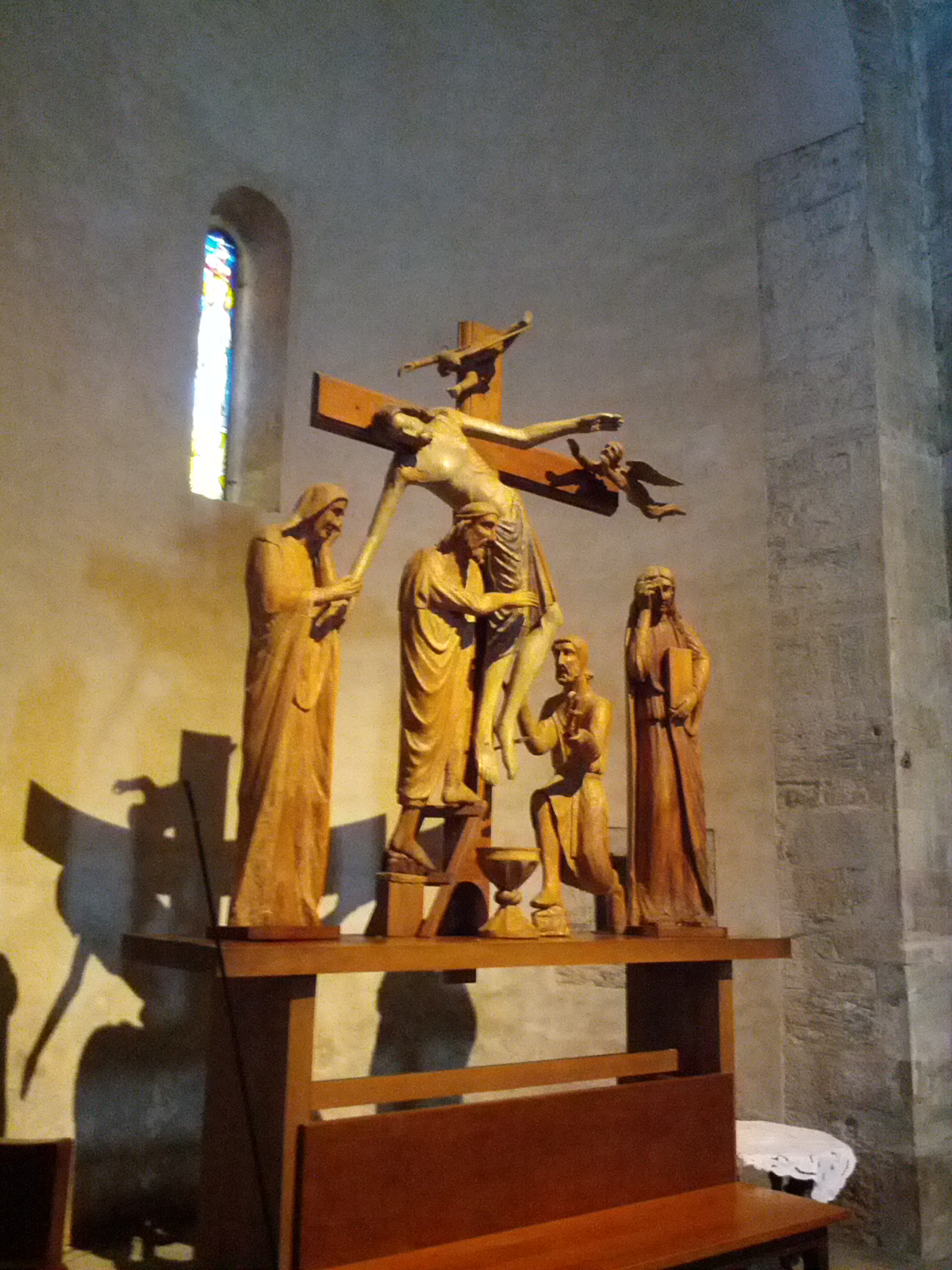 Deposizione lignea, collocata nell'abside della Pieve di Santa Maria di Vicopisano (PI)